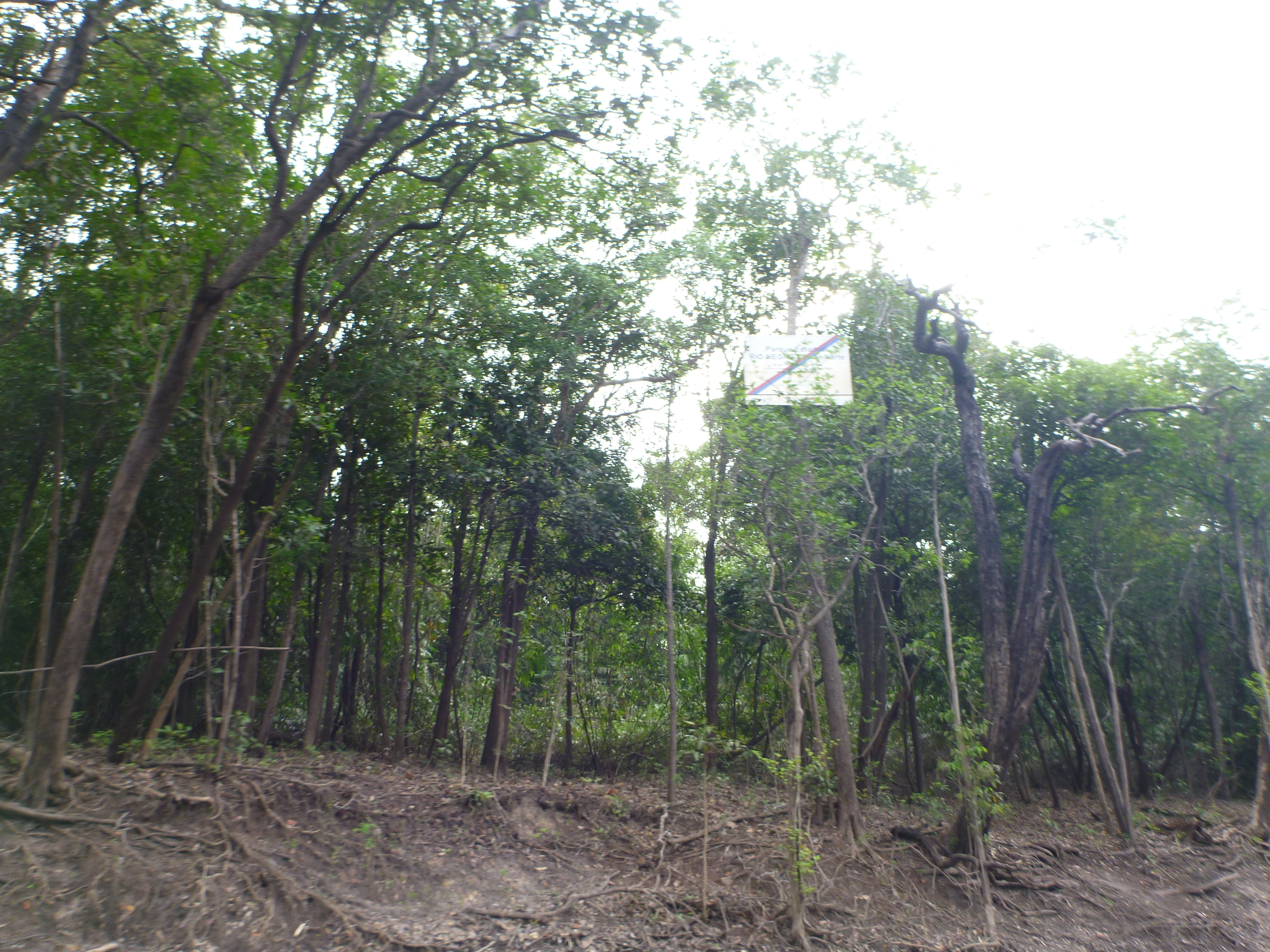 Igapó Jaú